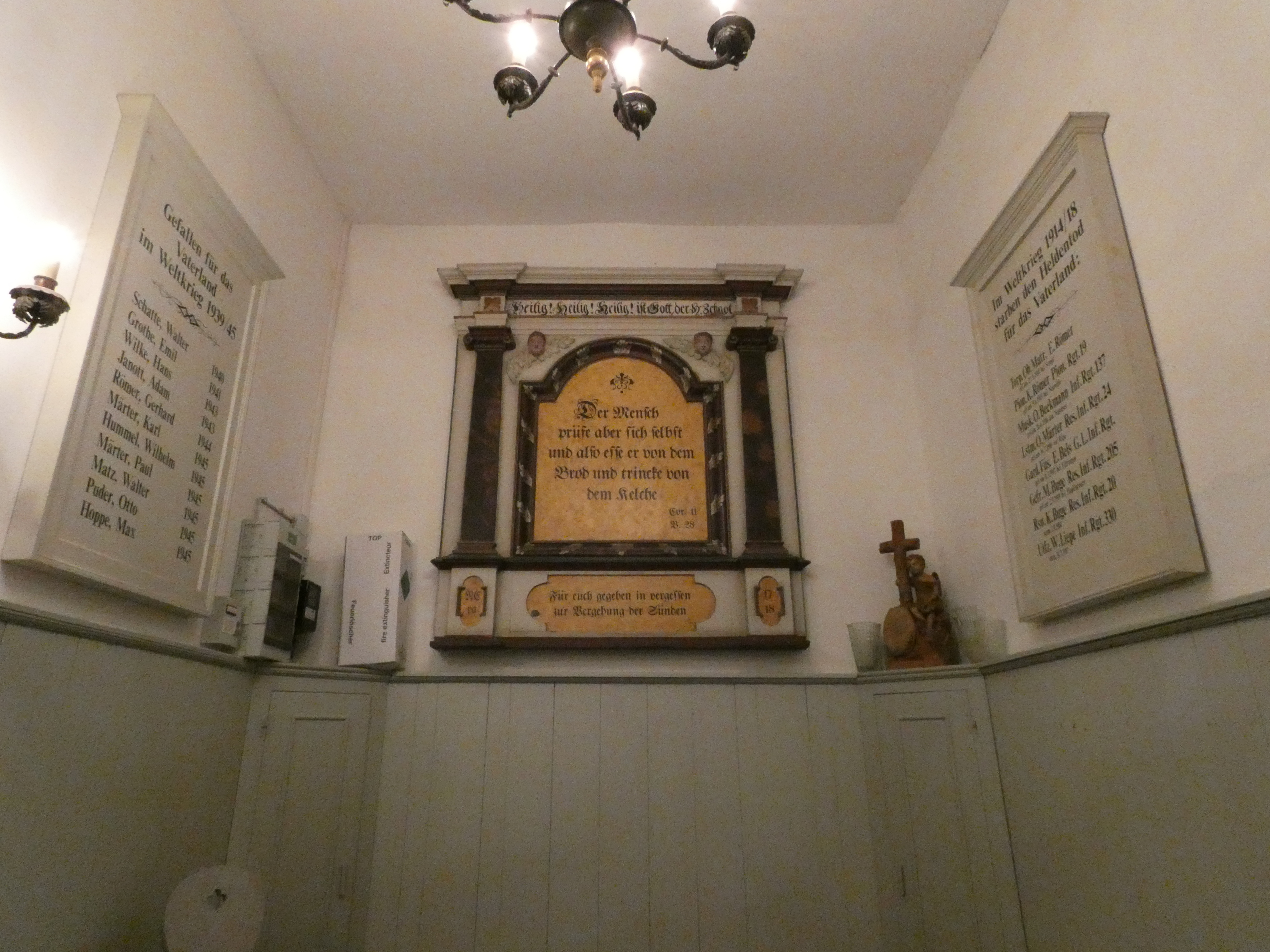 Dorfkirche Riewend, Holztafeln